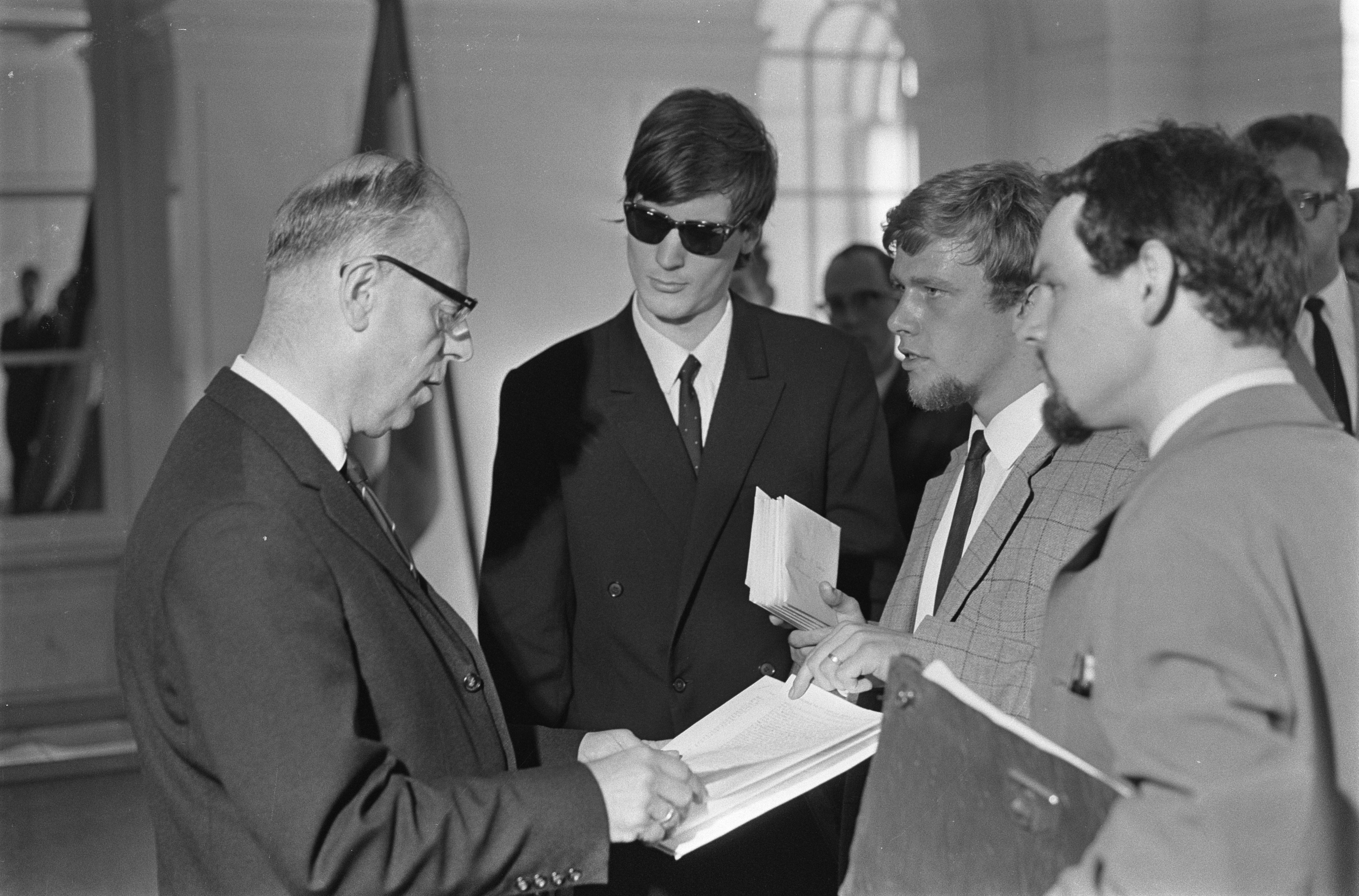 Collectie / Archief : Fotocollectie Anefo Reportage / Serie : [ onbekend ] Beschrijving : Protestaktie SVB tegen beurzenbeleid, afgevaardigden geven afschrift aan de heer P. Goosens (chef administrateur) Datum : 5 juli 1966 Trefwoorden : AFGEVAARDIGDEN, Protestacties Persoonsnaam : P. Goosens Fotograaf : Nijs, Jac. de / Anefo Auteursrechthebbende : Nationaal Archief Materiaalsoort : Negatief (zwart/wit) Nummer archiefinventaris : bekijk toegang 2.24.01.05 Bestanddeelnummer : 919-3211